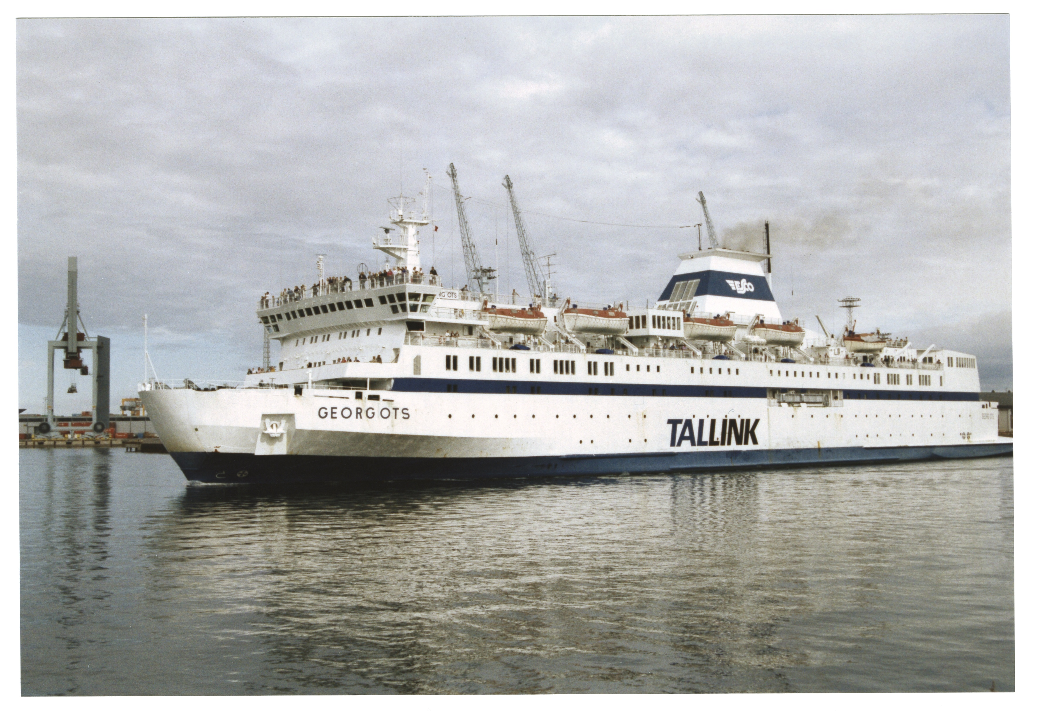 M/S Georg Ots Helsingin Länsisataman edustalla .